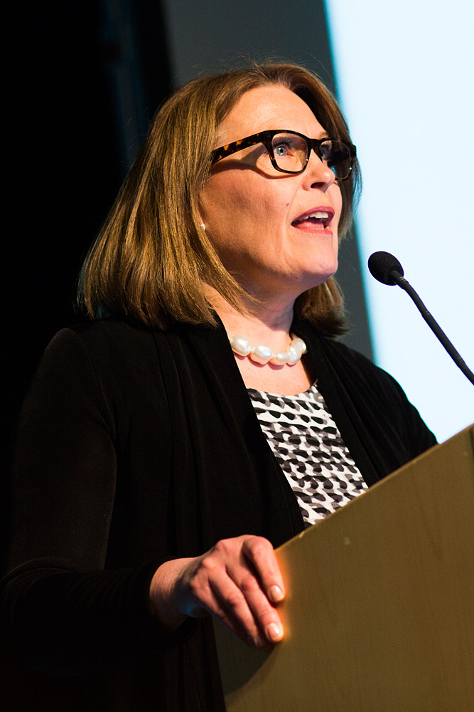 Karin Johansson, statssekreterare hos Göran Hägglund på Socialdepartementet, invigningstalar på konferensen Vitalis-2013 på Svenska Mässan i Göteborg.